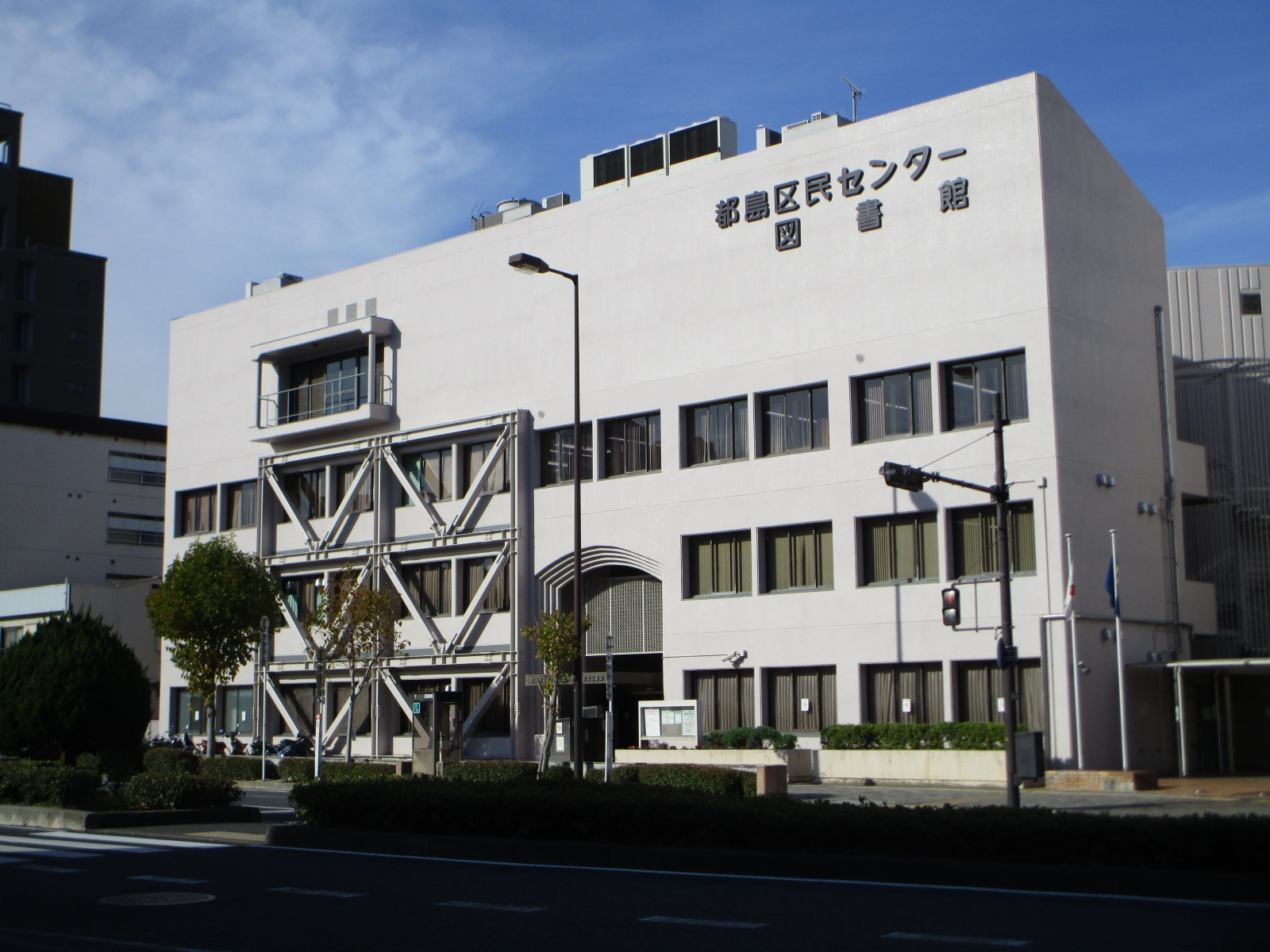 大阪市立都島図書館